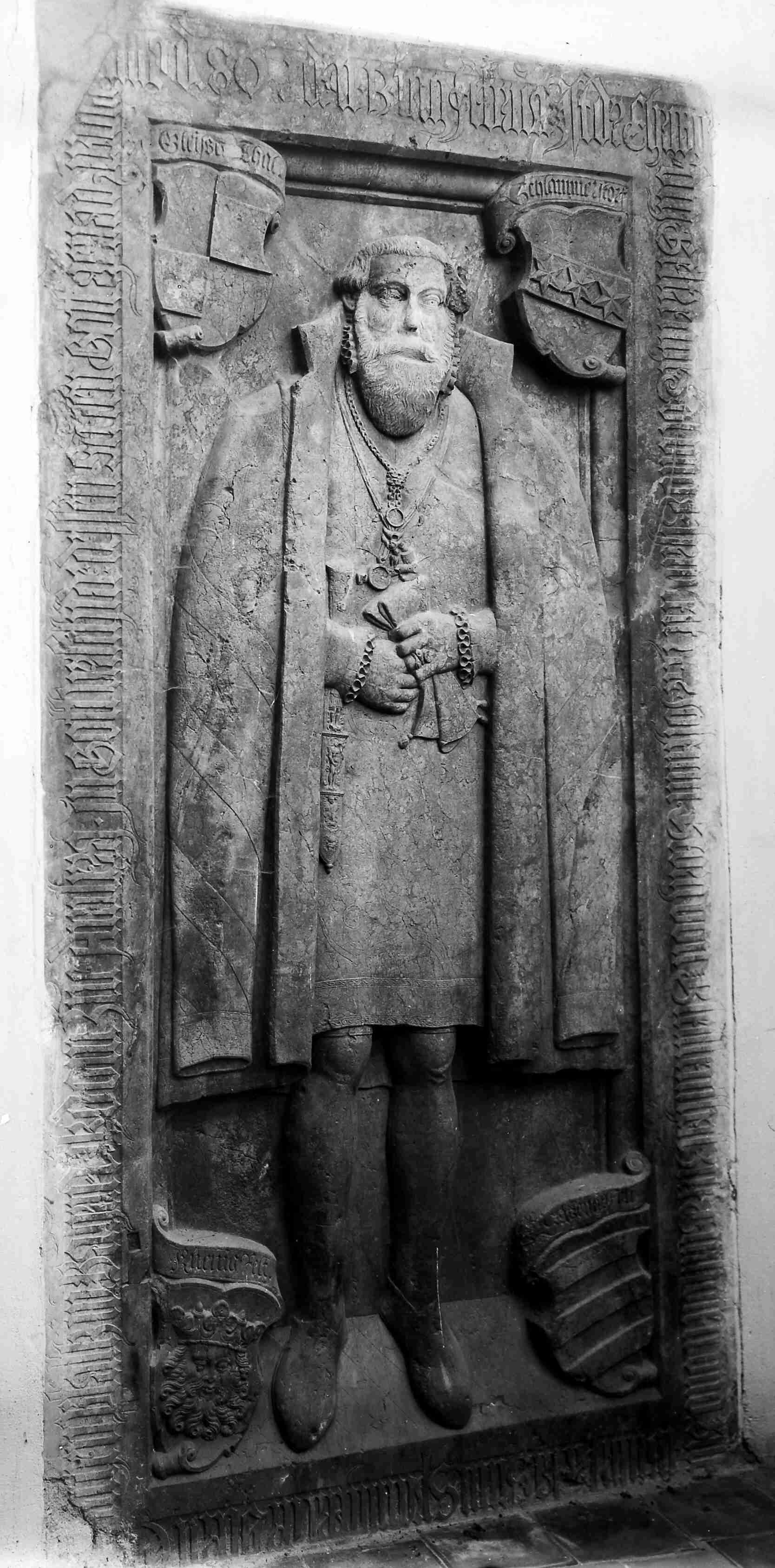 Grabplatte für Johann Georg von Gleißenthals, heute in der ev. Stadtpfarrkirche in Neustadt am Kulm